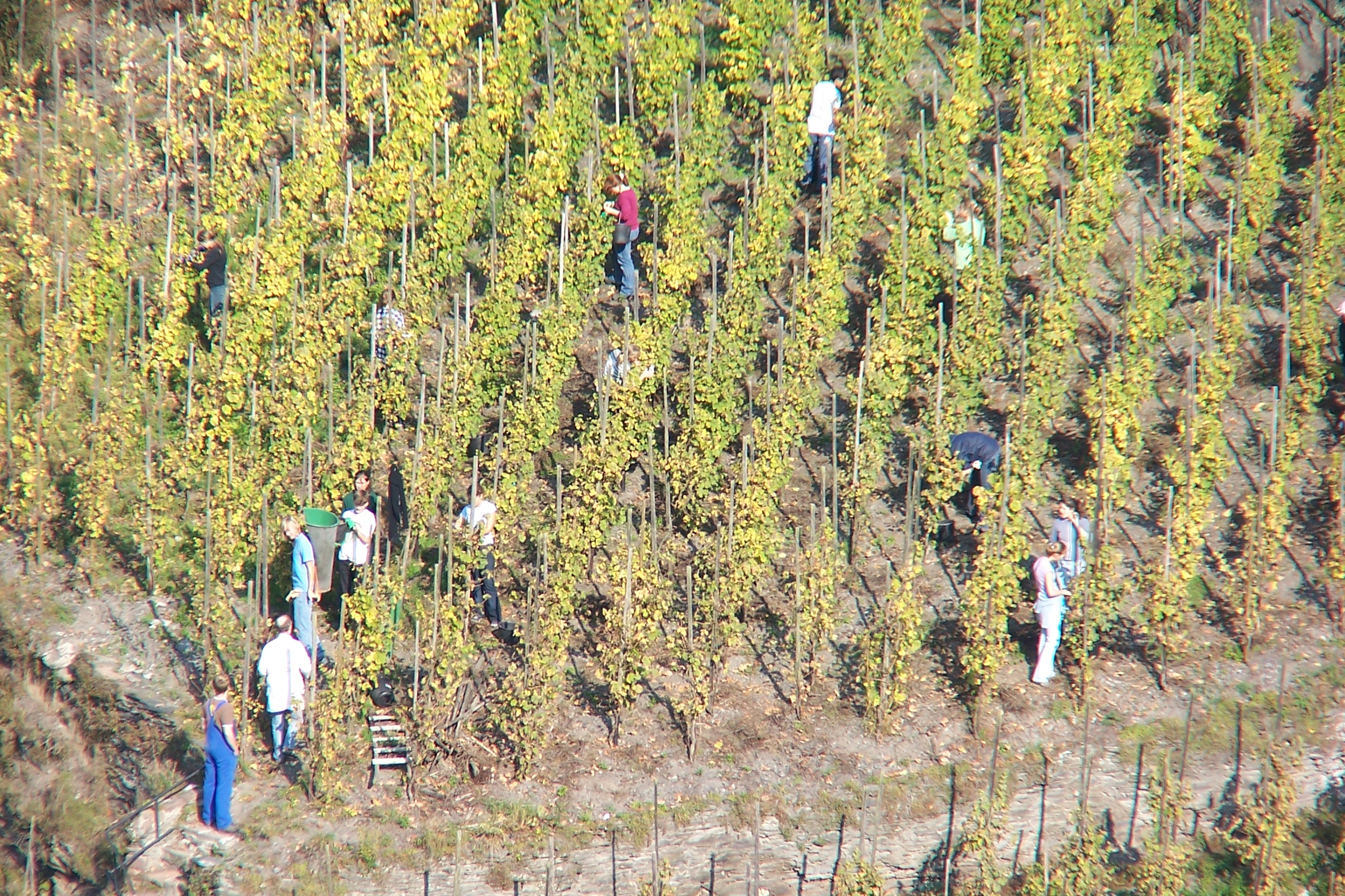 Weinlese in Bernkastel-Kues